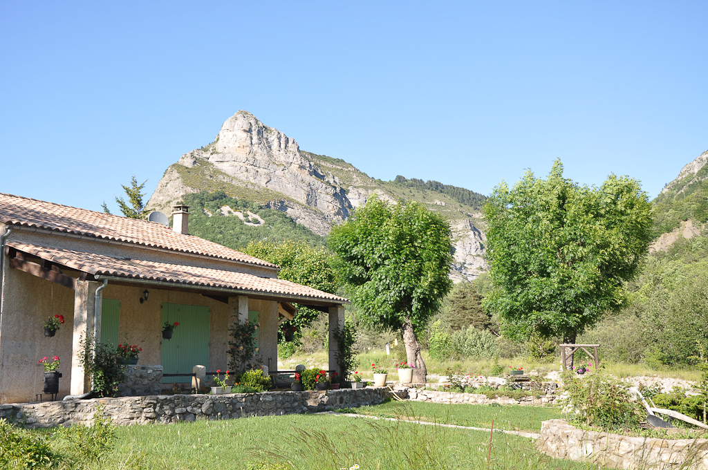 Maison à Authon